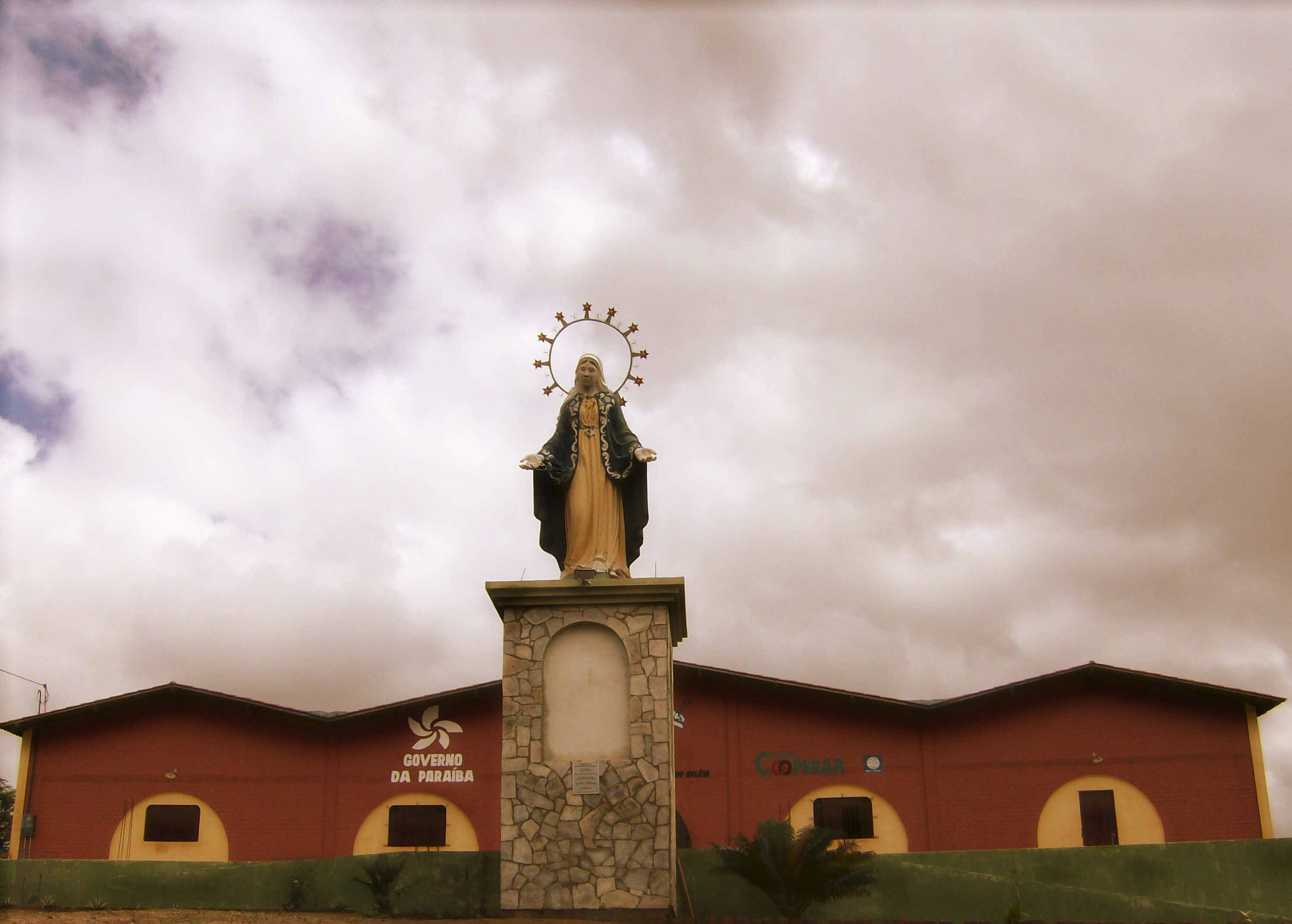 Abrigo Bom Pastor em Belém-PB